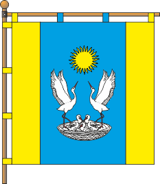 Прапор с. Долинівка (Арцизький район)